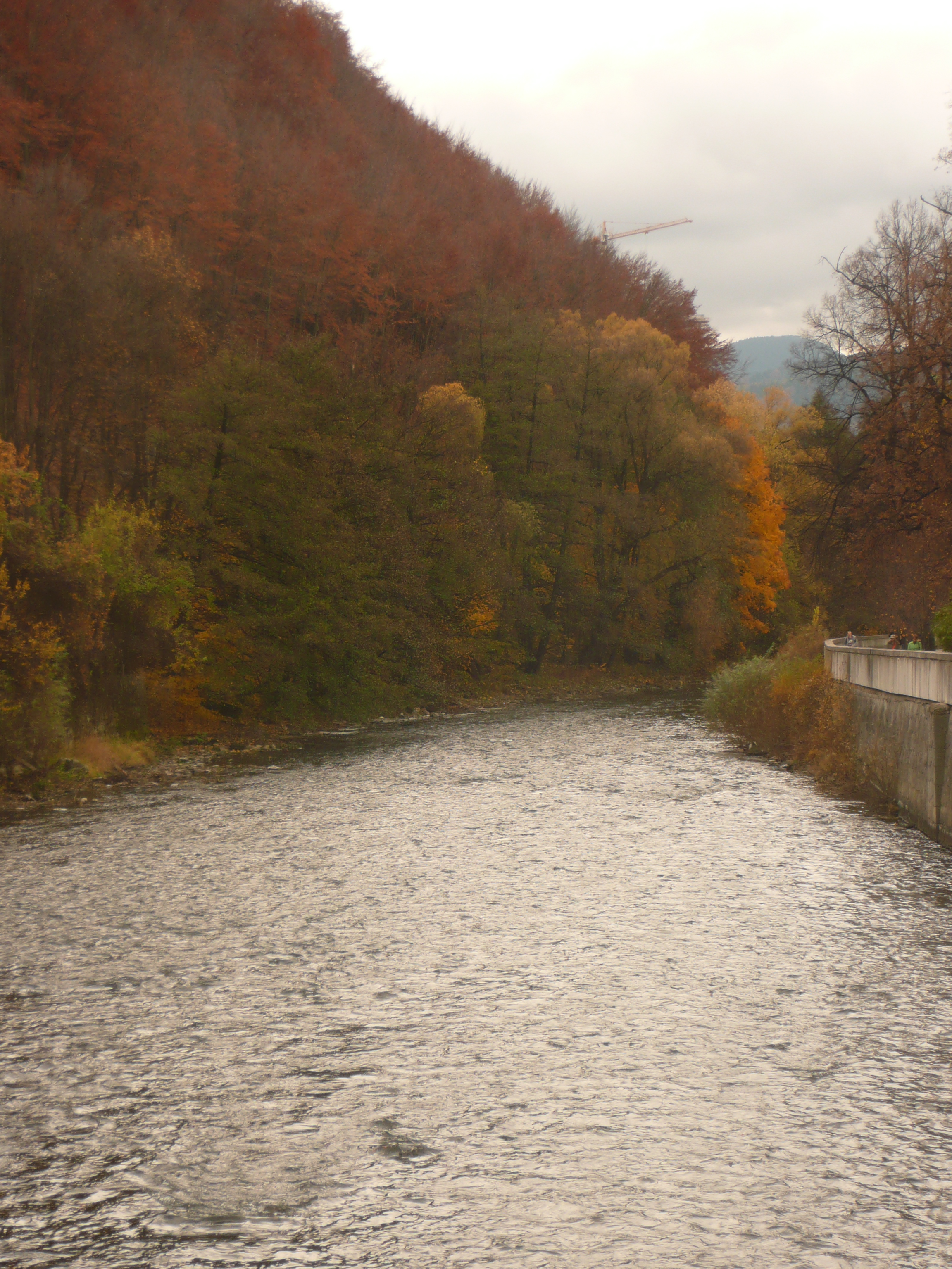 rieka